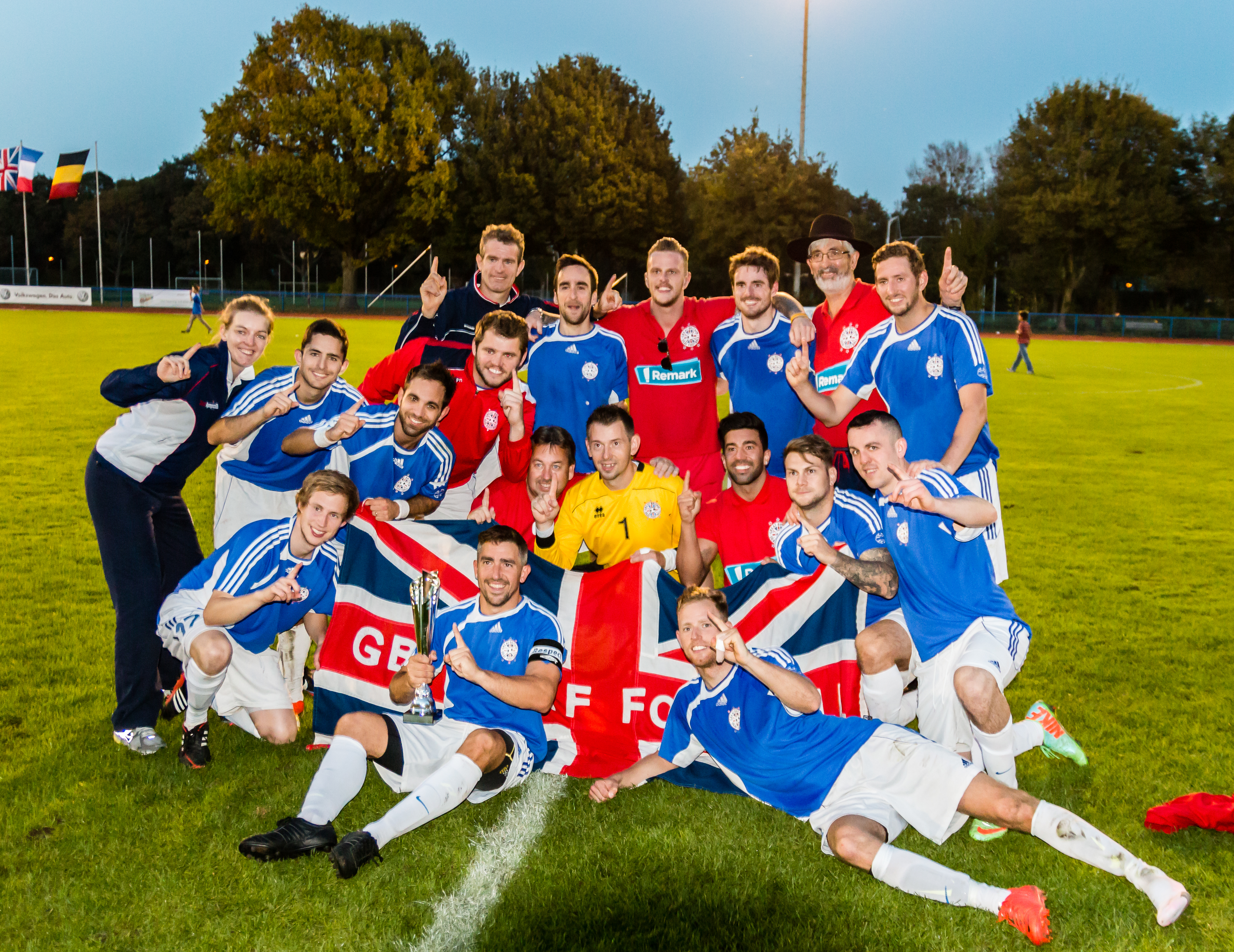 Gehörlosen Fußball Nationalmannschaft von Großbritannien. Vom 3.- 4. Oktober 2014 fand in Hannover ein Fußball Länder-Cup der Gehörlosen statt. Teilnehmer waren neben Großbritannien und Deutschland, Frankreich und Belgien, die nach Absage der Ukraine und Russland für eine Teilnahme gewonnen werden konnten.